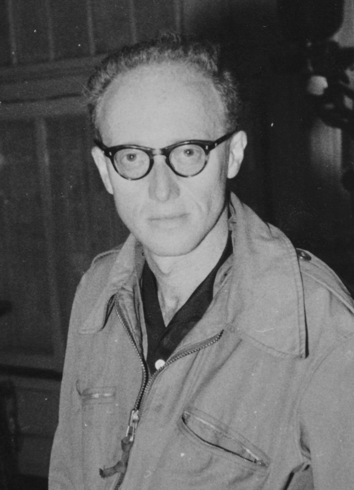 Georg Scheuer 1955, Ausschnitt der Reproduktion der Originalfotografie, aufgenommen von Karl Fischer (1918-1963)